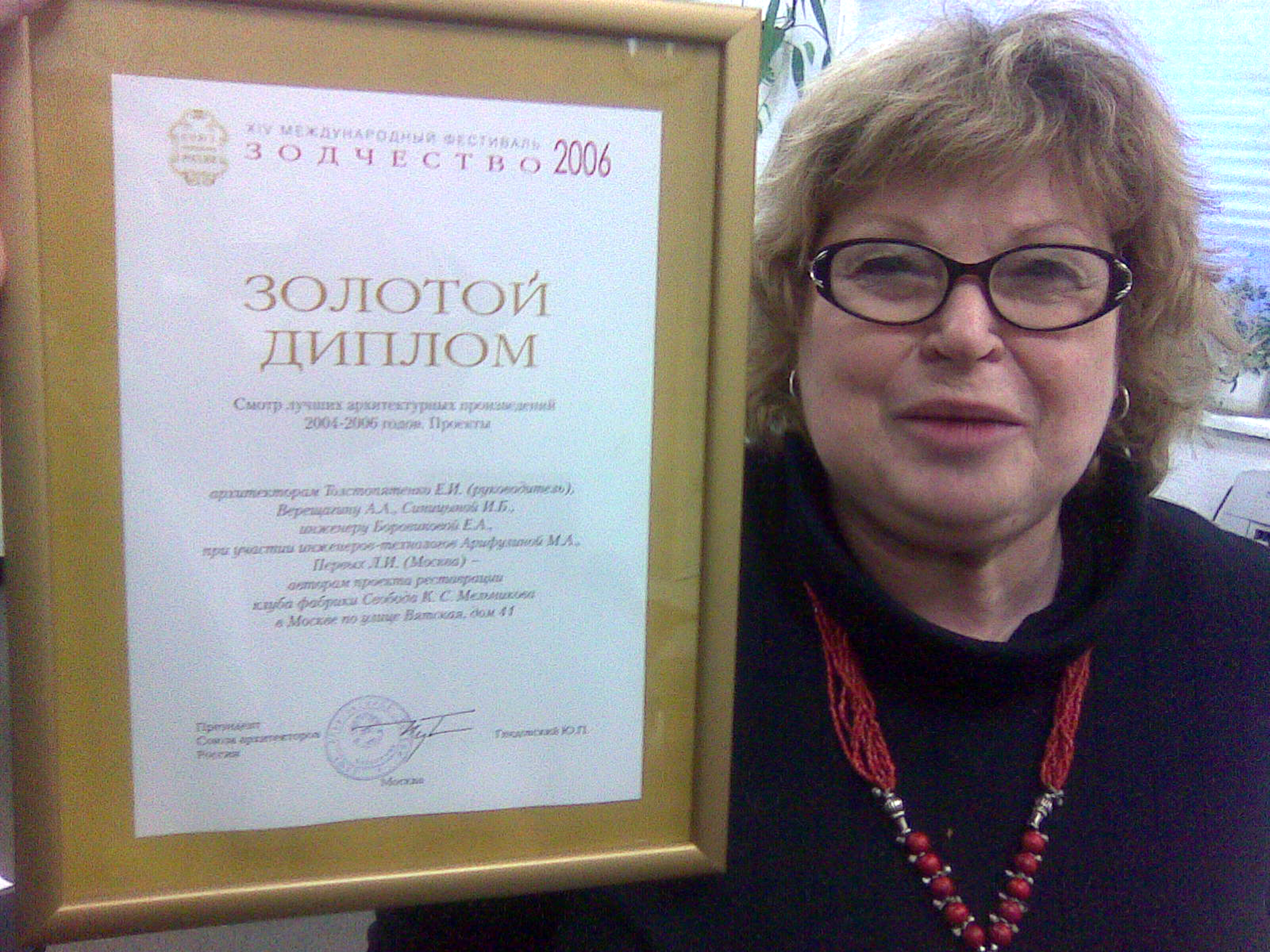 Главный архитектор проекта Толстопятенко Е.И. по Клубу фабрики "Свобода" на вручении золотого диплома.